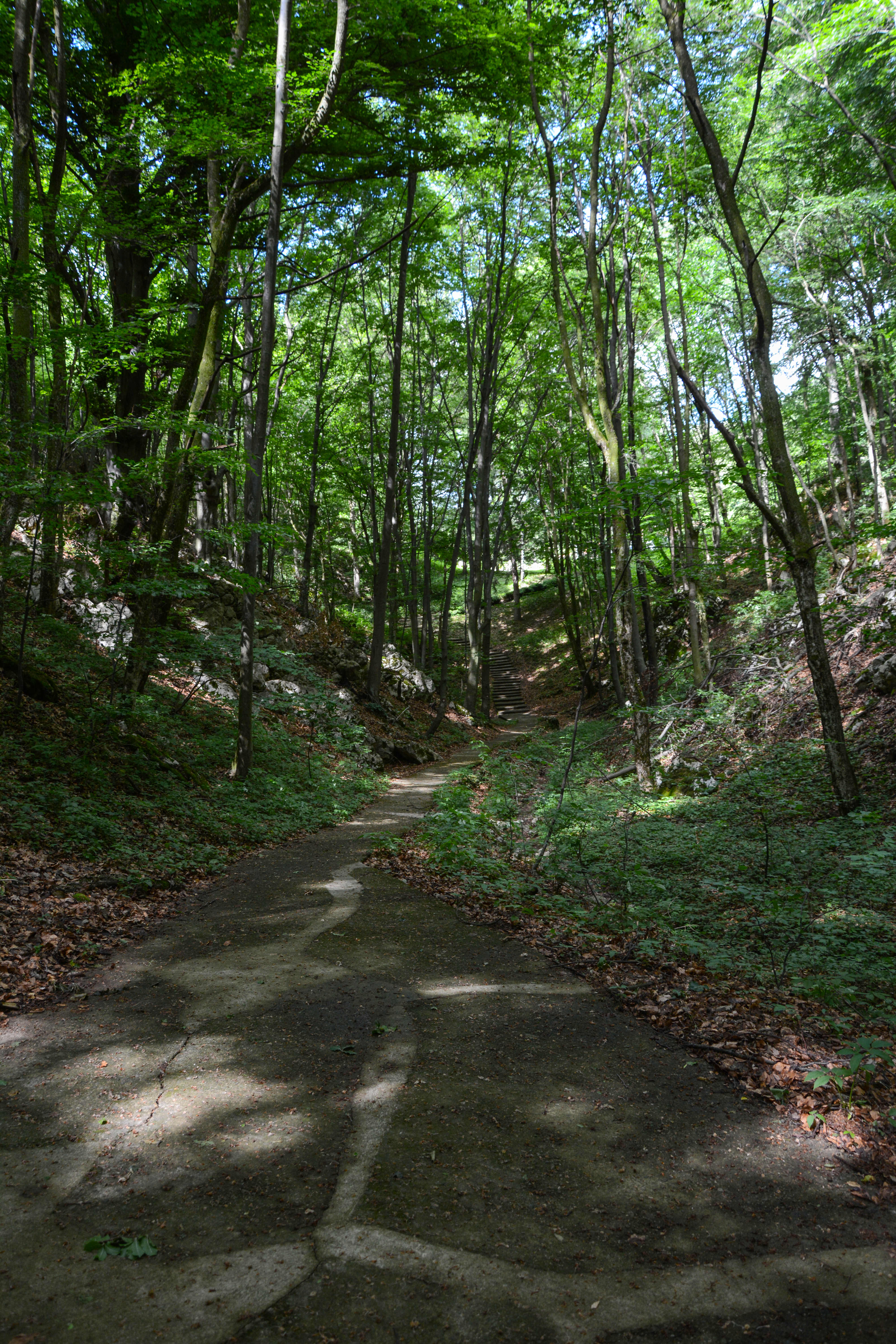 Кучај код Церемошње